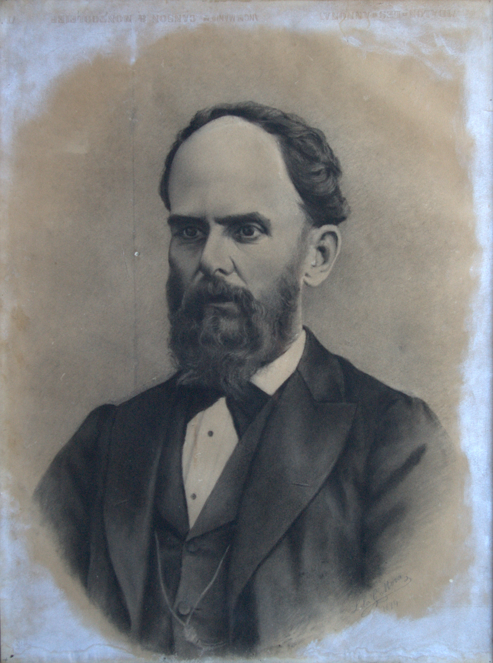 Gobernador del Campo. Cuadro en carbonilla sobre papel canson, con firma "Lola C. Mora ,1894". Integra una galería de 25 retratos de gobernadores tucumanos; expuestos en San Miguel de Tucumán. Actualmente, en el Museo Histórico provincial de esa ciudad